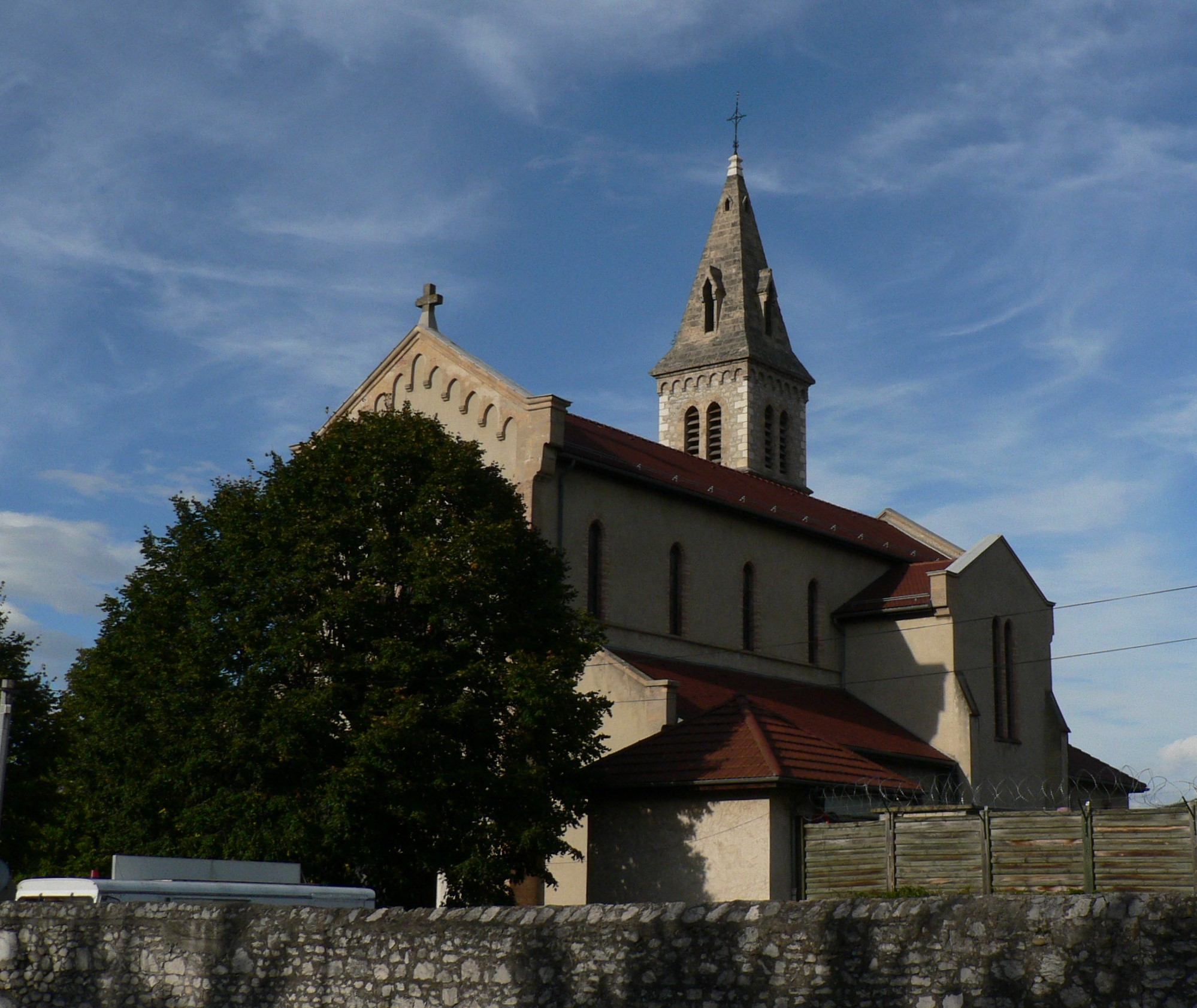 Église Saint-Etienne (Le Pont-de-Claix)